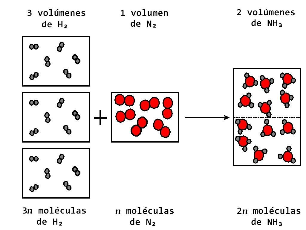 Esquema sínteis amoniaco